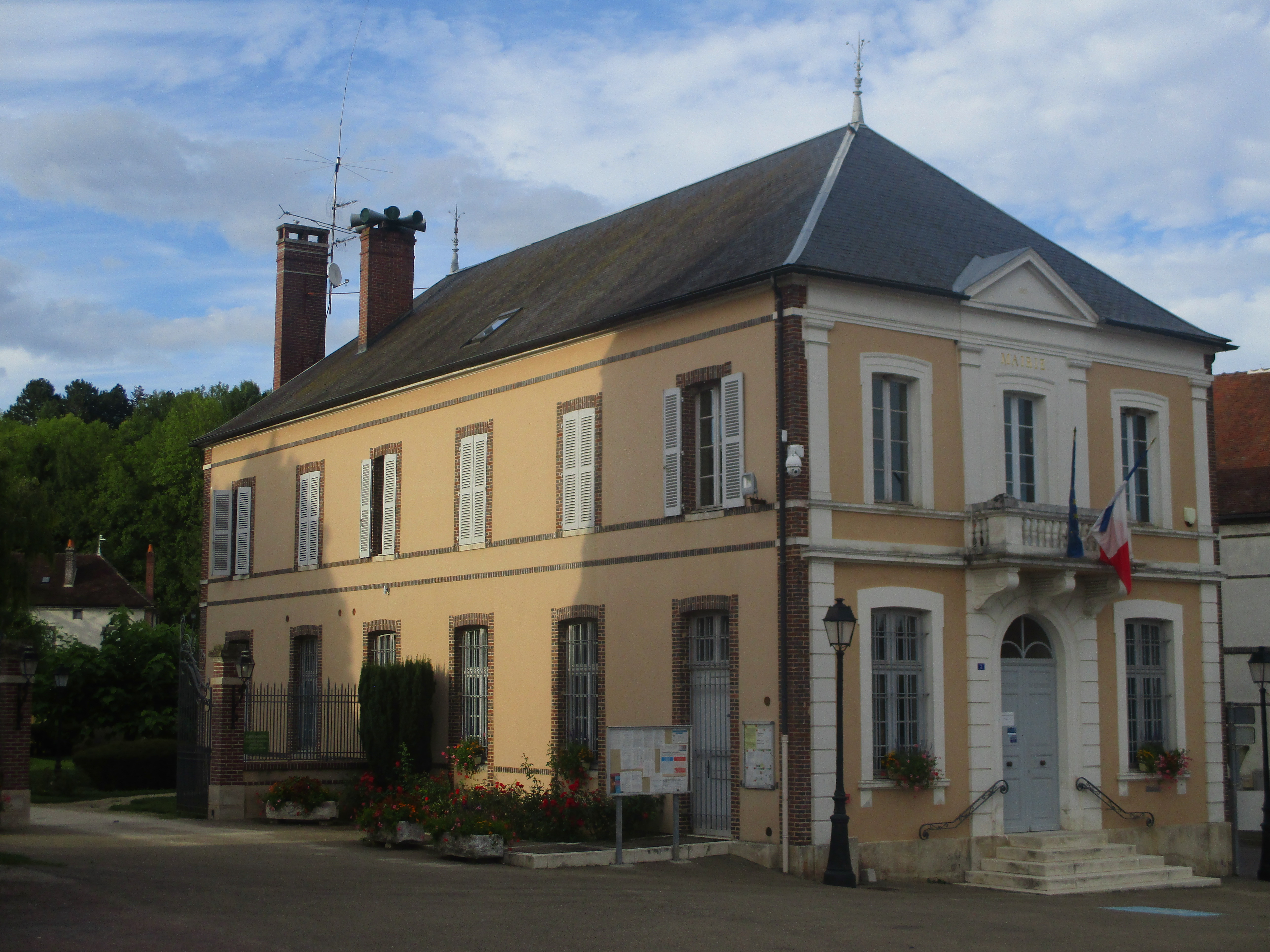 Mairie de Bussy-en-Othe (Yonne).